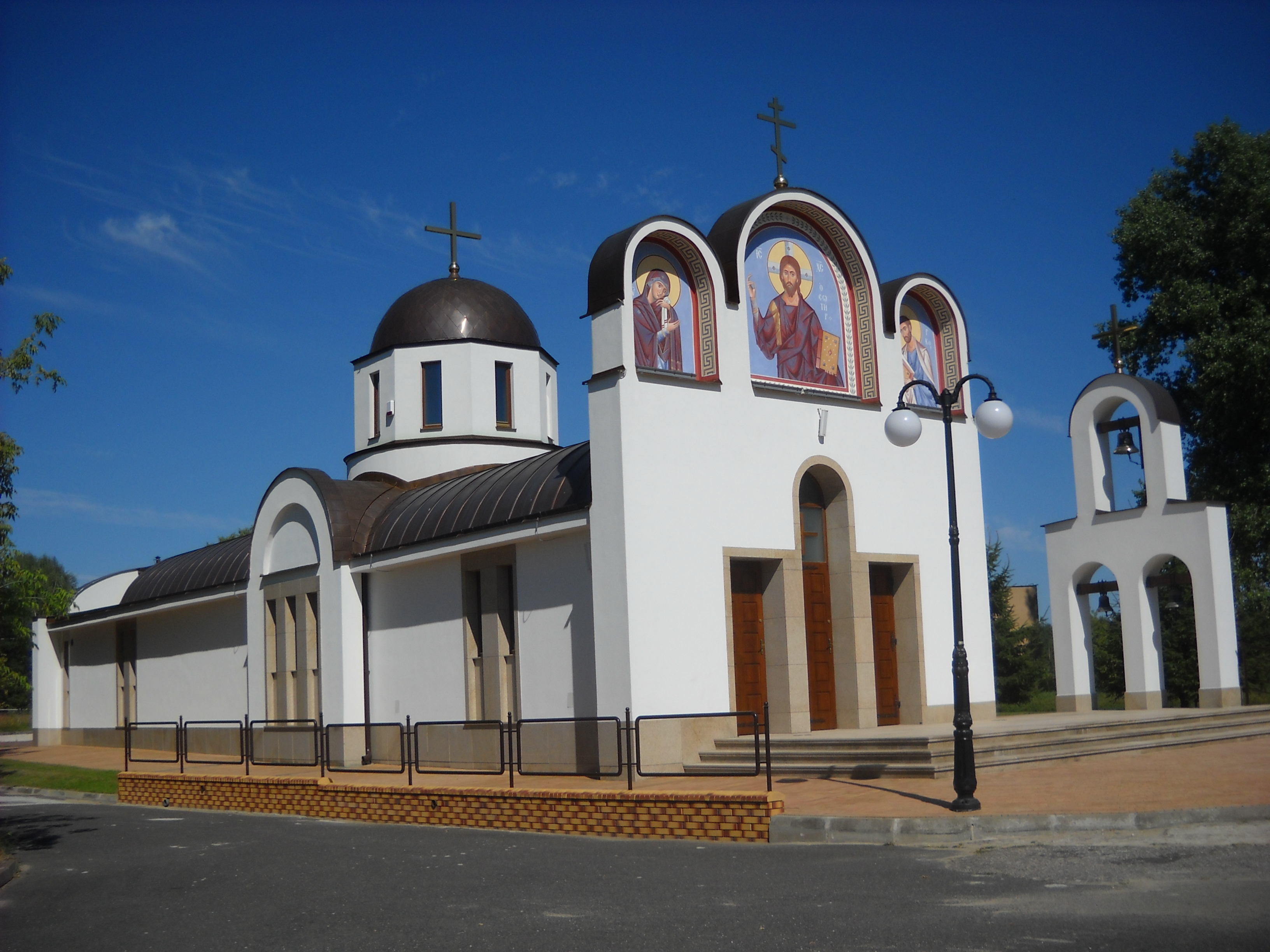 Cerkiew wojskowa w Białej Podlaskiej